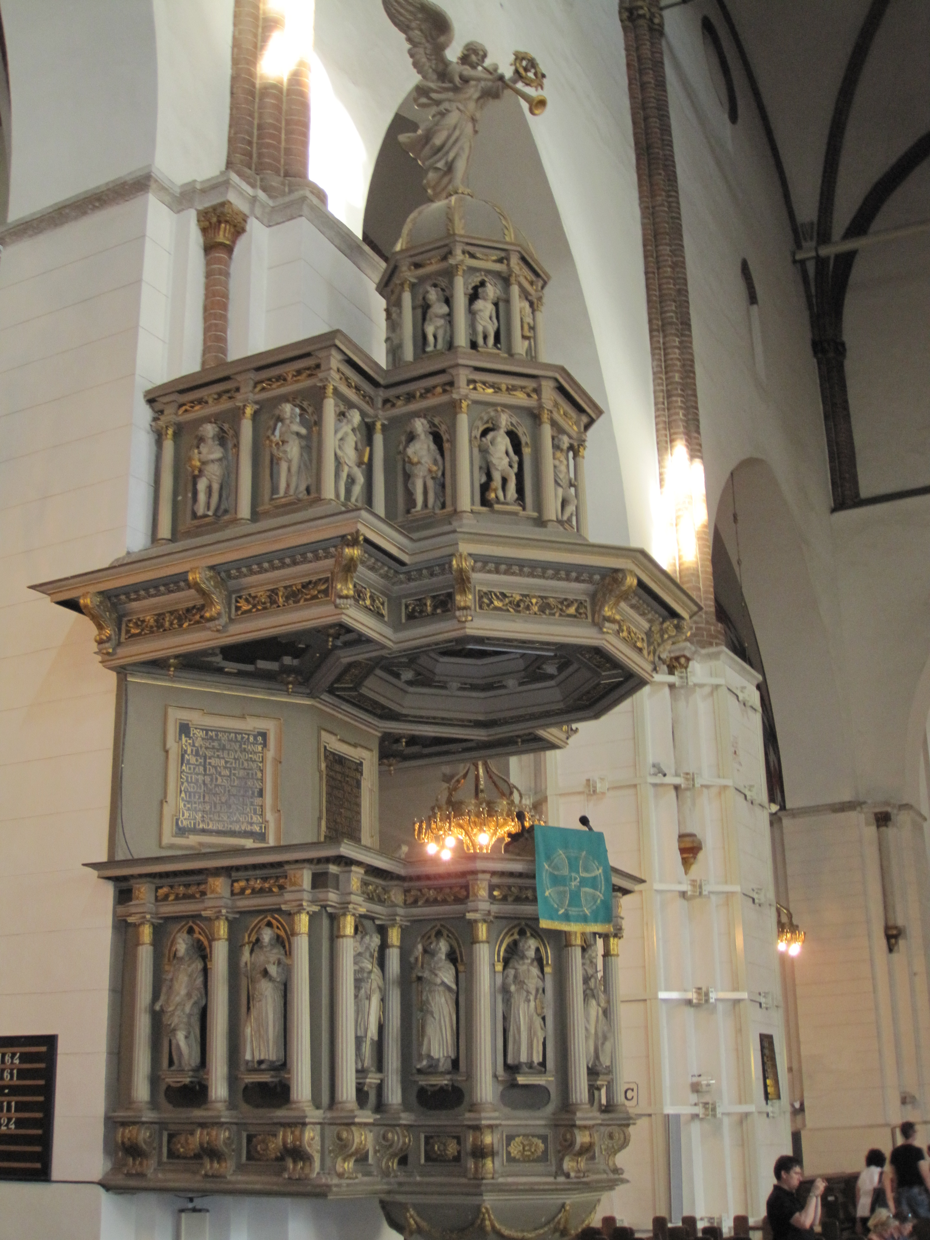 Dom zu Riga - Kanzel